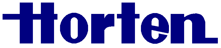 Frühe deutlich schlankere Variante des Horten-Logos aus den frühen 1960er Jahren, angewendet zum Beispiel bei der Filiale in Wuppertal ab 1963. Zeitgleich existierten auch schon fülligen Varianten, zum Beispiel in Aachen, die dem später verwendeten Standard sehr viel näher kamen. Anfang der 1960er gab es erst einige wenige "Horten" heißende Warenhäuser in Deutschland. Der größte Teil der Horten-Gruppe hieß zu diesen Tagen MERKUR oder DeFaKa. Erst Ende 1960er Jahren wurde Horten die Haupt- und später alleinige Marke. Diese Variante fand jedoch keine große Verbreitung und verschwand recht schnell wieder von der Bildfläche.